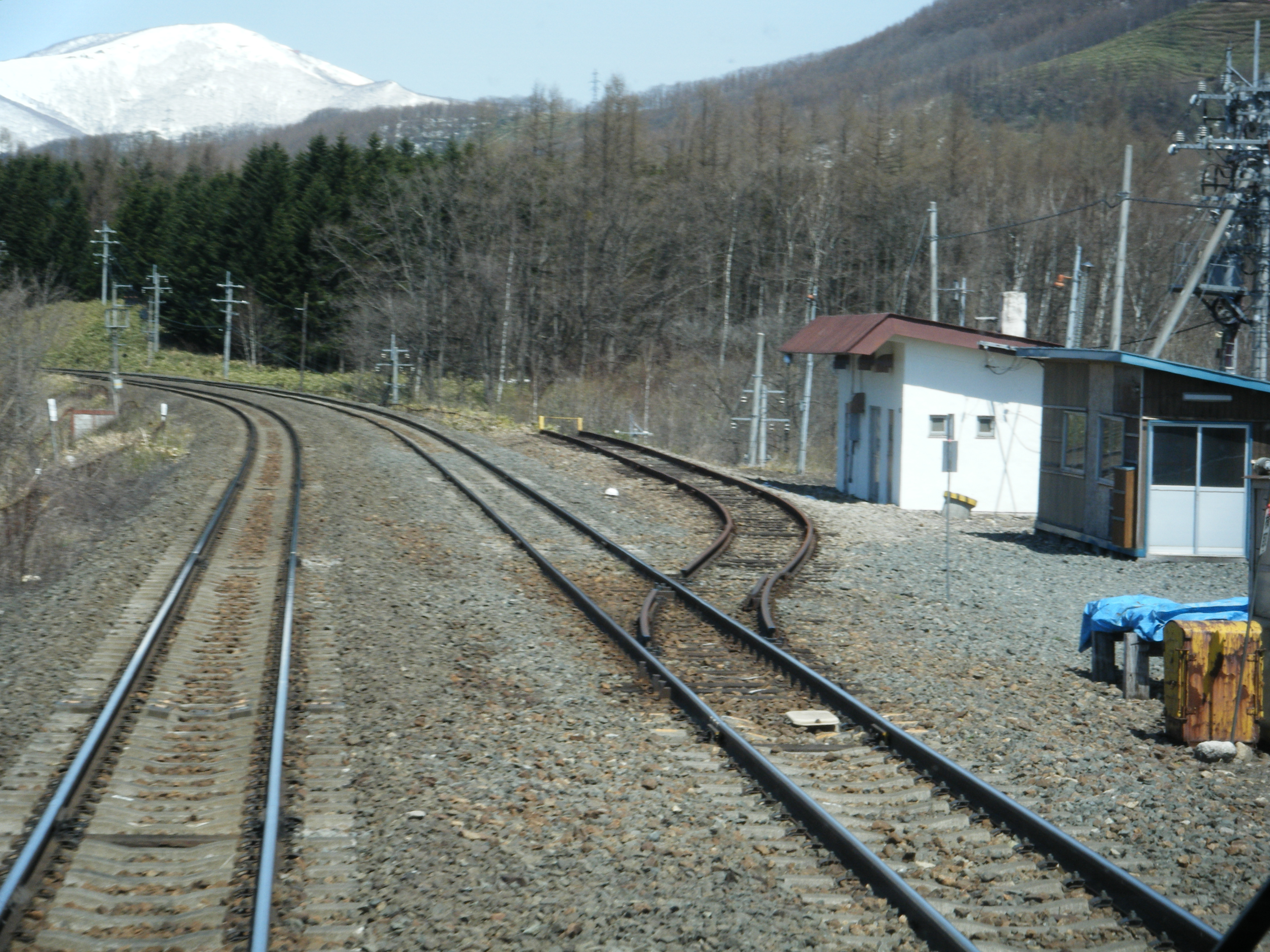 西新得信号場（JR北海道 石勝線）。普通列車車内より撮影。